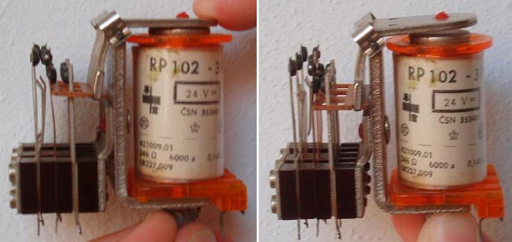 vlastní fotka